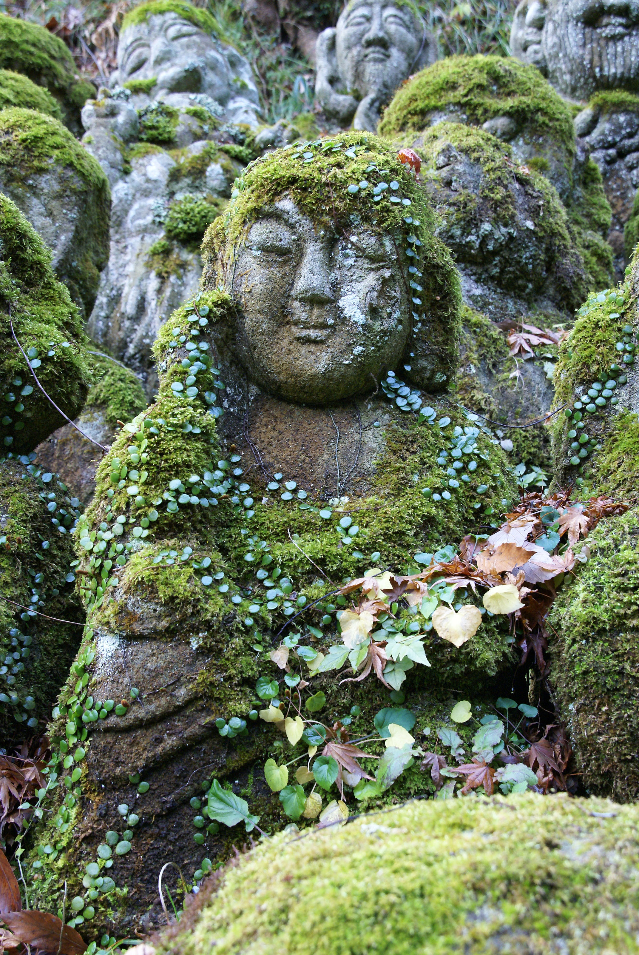 Otagi-nenbutsuji in Sagano, Kyoto, Japan